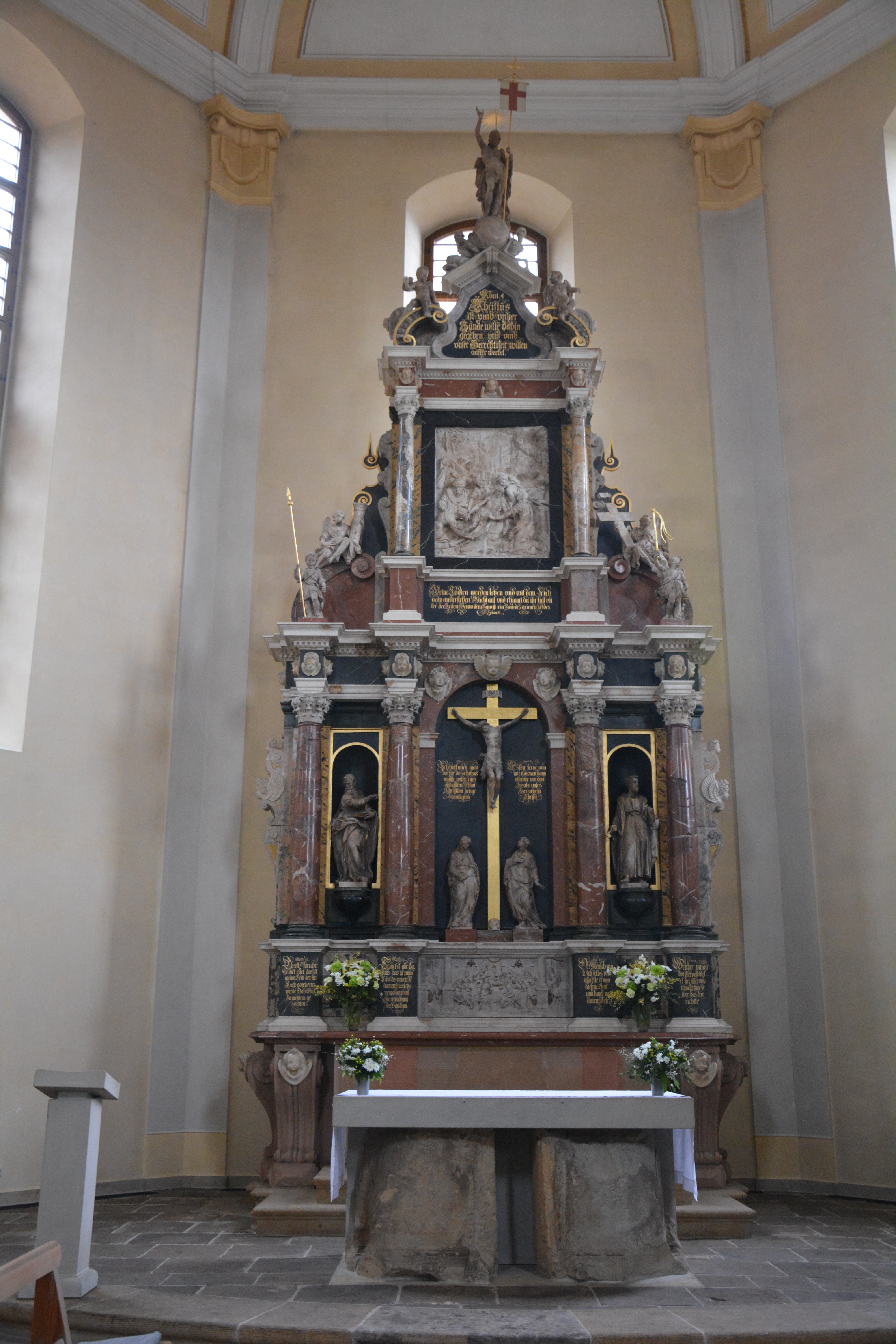 Nosseni-Altar in der Loschwitzer Kirche. Restaurierung bzw. Rekonstruktion der bildhauerischen Elemente des Nosseni-Altars, Stuckmarmor und Alabaster, Loschwitzer Kirche wurden vom Dresdner Bildhauer Christian Schulze ausgeführt